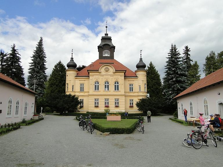 Zámek Doloplazy, Doloplazy 15